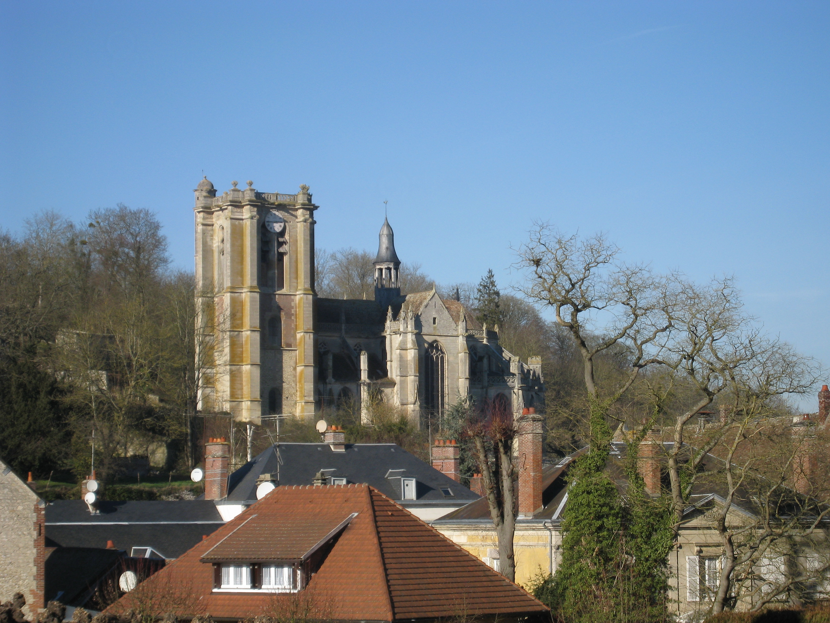 Chaumon en Vexin, l'église St Jean Baptiste, Oise, France